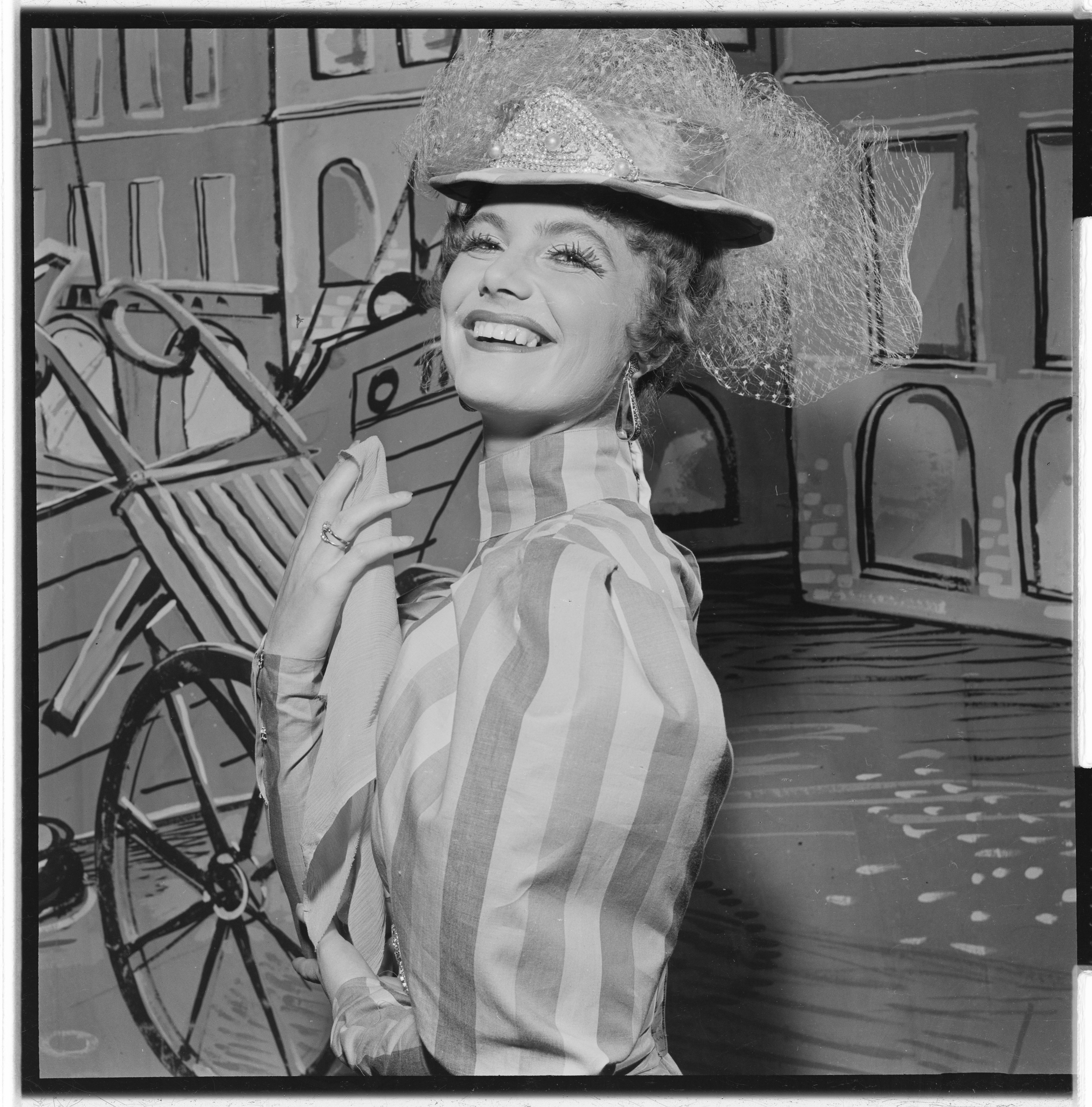 Bildet er hentet fra Arkivverket. Chat Noir revyen 1955. NÅ nr. 37,1955 Arkivinstitusjon : Riksarkivet Arkivnavn : Billedbladet NÅ Sted : Norge, Oslo, Oslo, Emneord: teater, revy, chat noir, skuespillere Avbildet